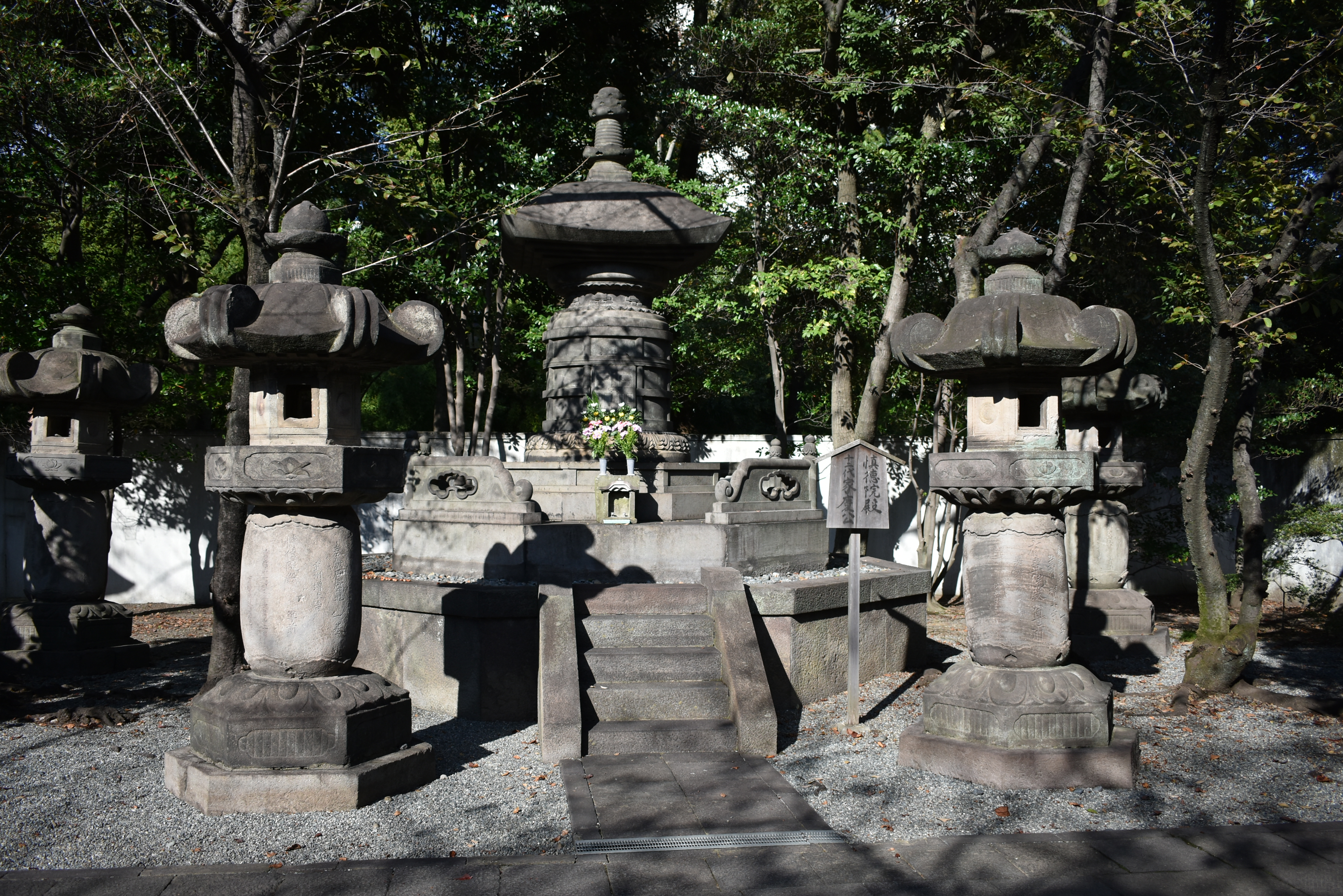 増上寺 御霊屋